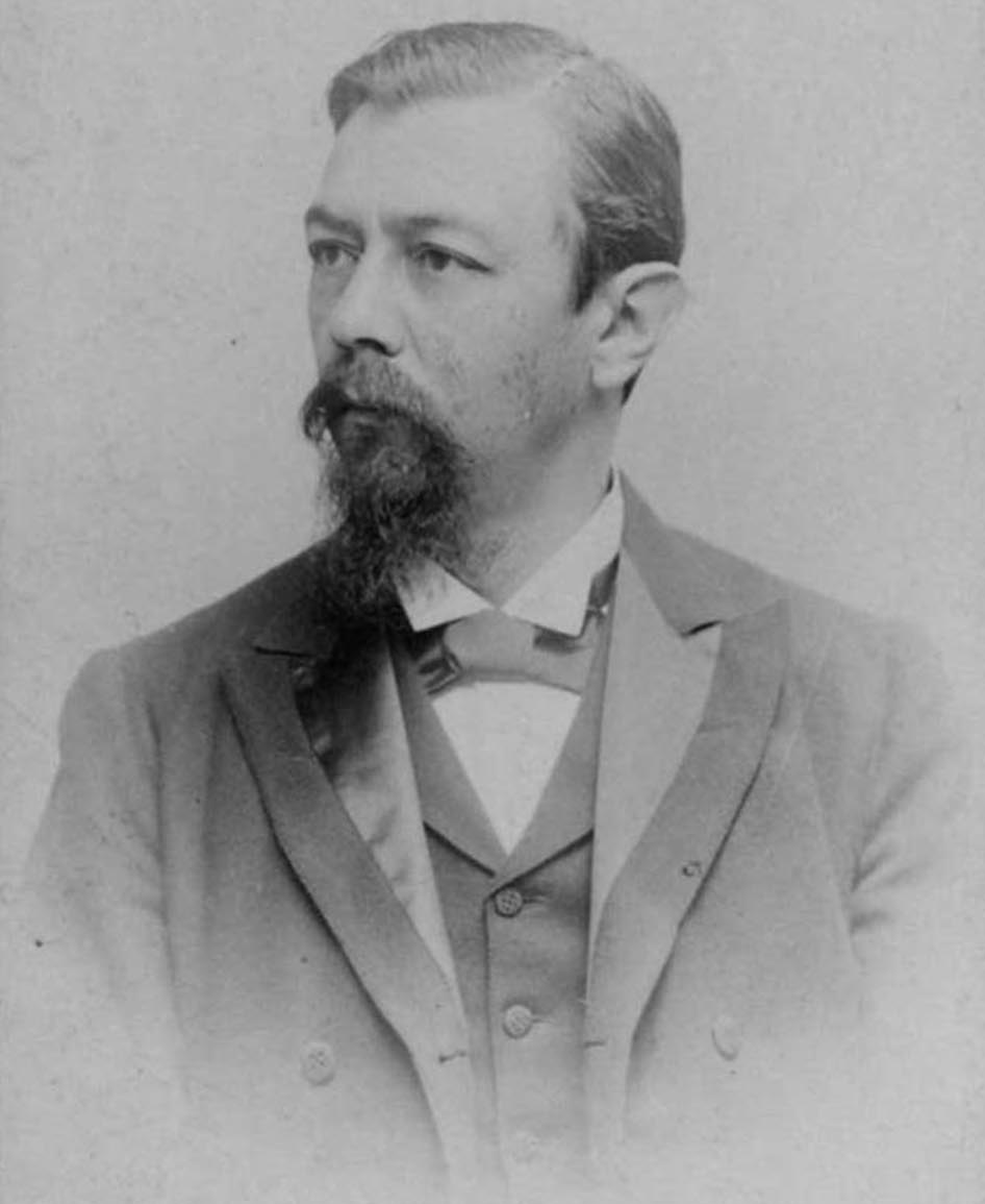 Der deutsche Altorientalist und Semitist Carl Bezold (1859-1922), Carte de Visite von "Ed. Schultze Heidelberg Plöckstrasse 79".